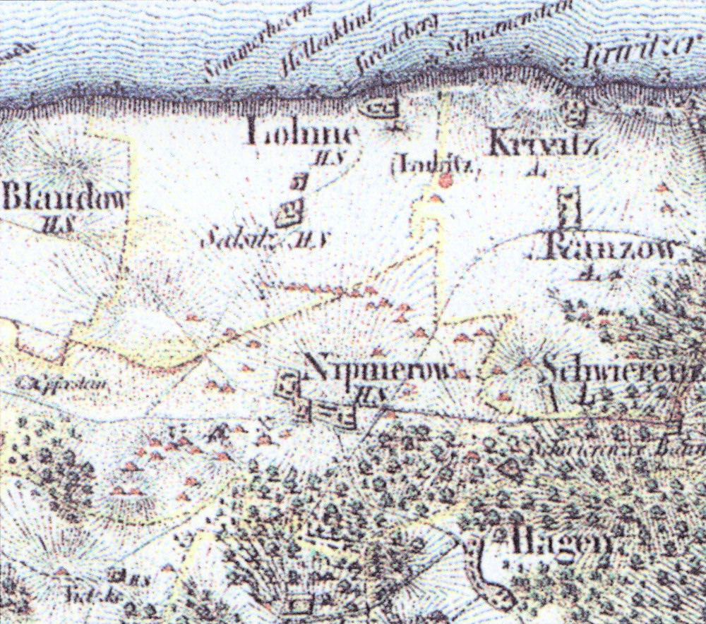 Im Jahre 1828 noch vorhandene bronzezeitliche Hügelgräber bei Nipmerow und Lohme auf der Insel Rügen